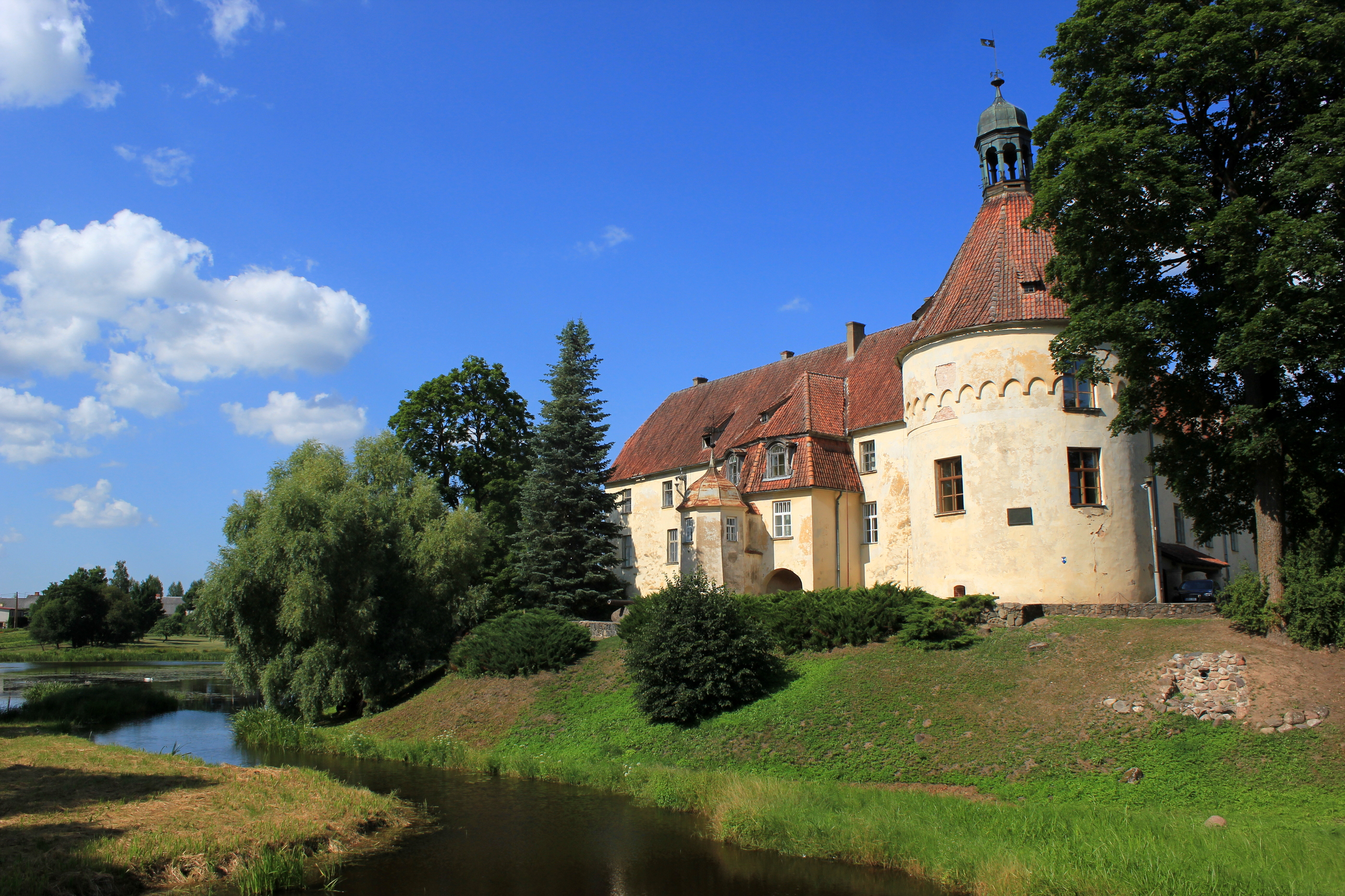 Schloss in Jaunpils, Lettland.